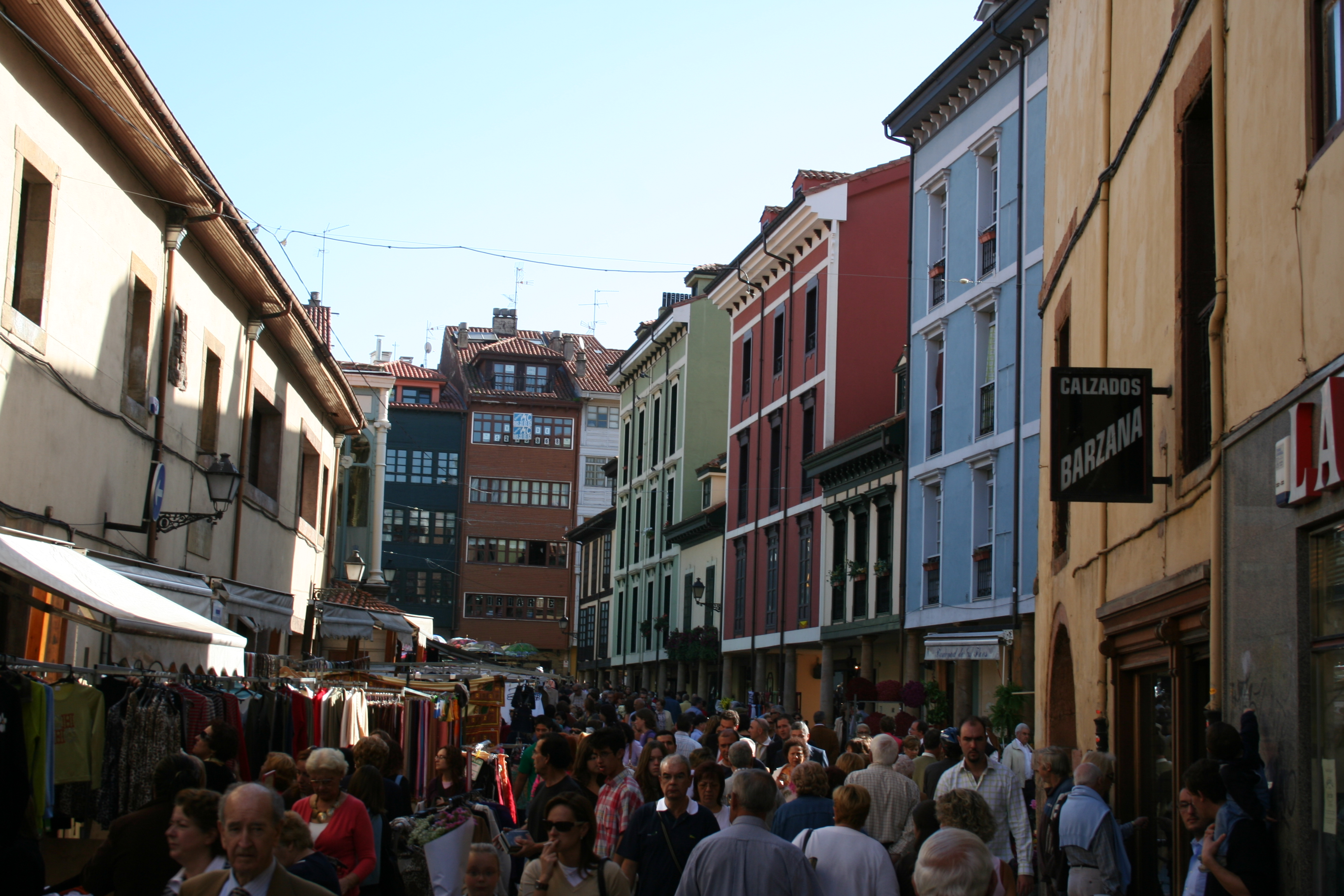 Plaza del Fontán en Oviedo